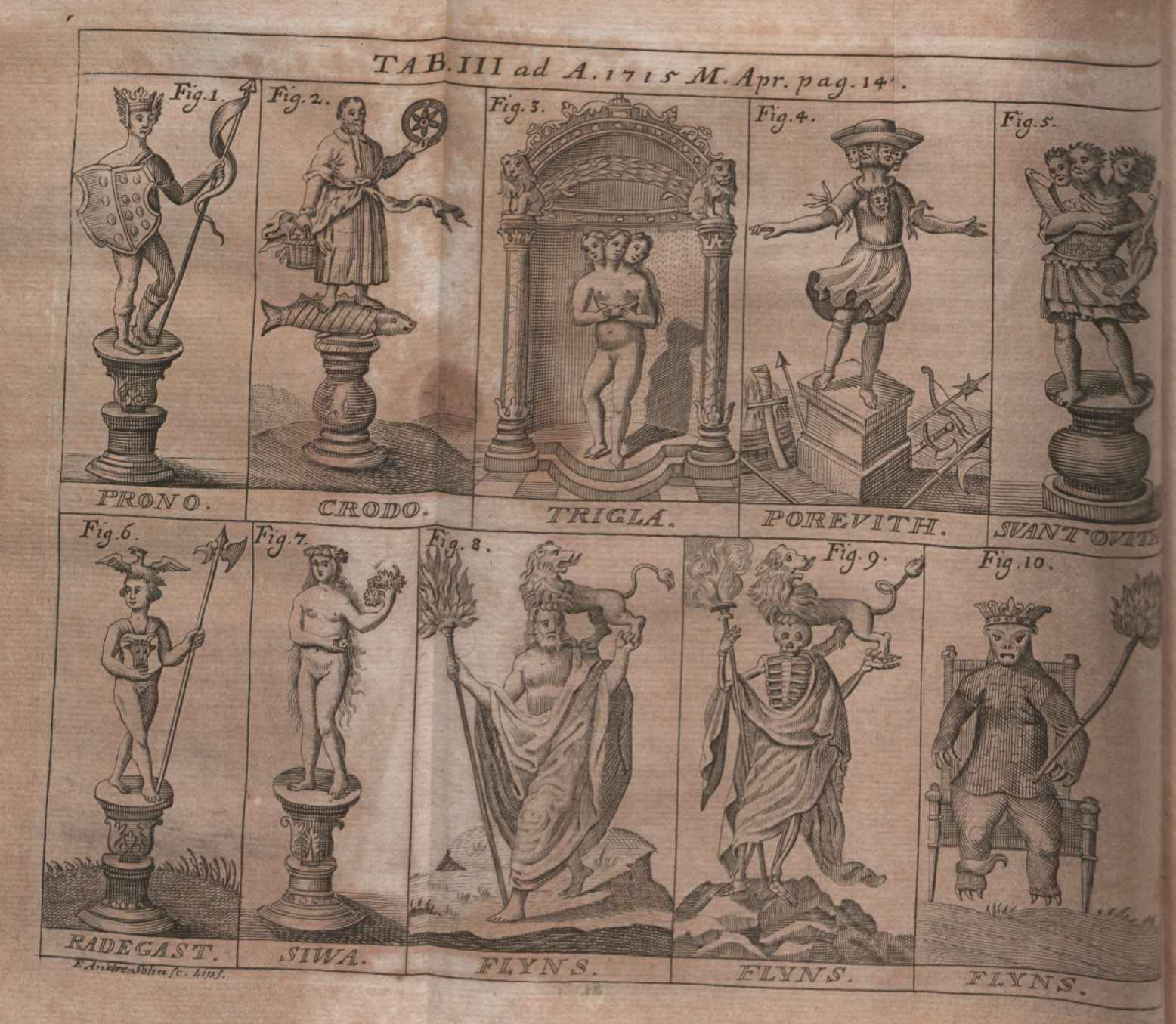 Illustration